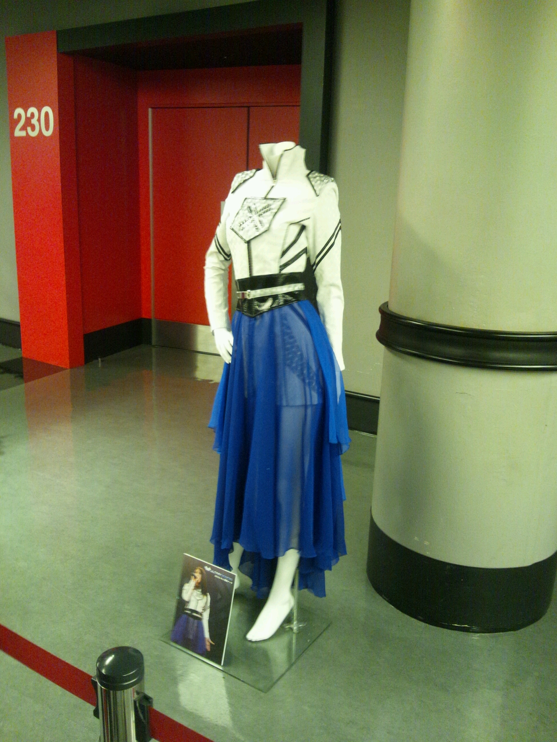 アニメロミックス Presents Minori Chihara Birthday Live 2012 supported by JOYSOUND 衣装展覧会より『Minori Chihara Live Tour 2012 〜D-Formation〜』、『Minori Chihara Live 2012 ULTRA-Formation』の衣装。